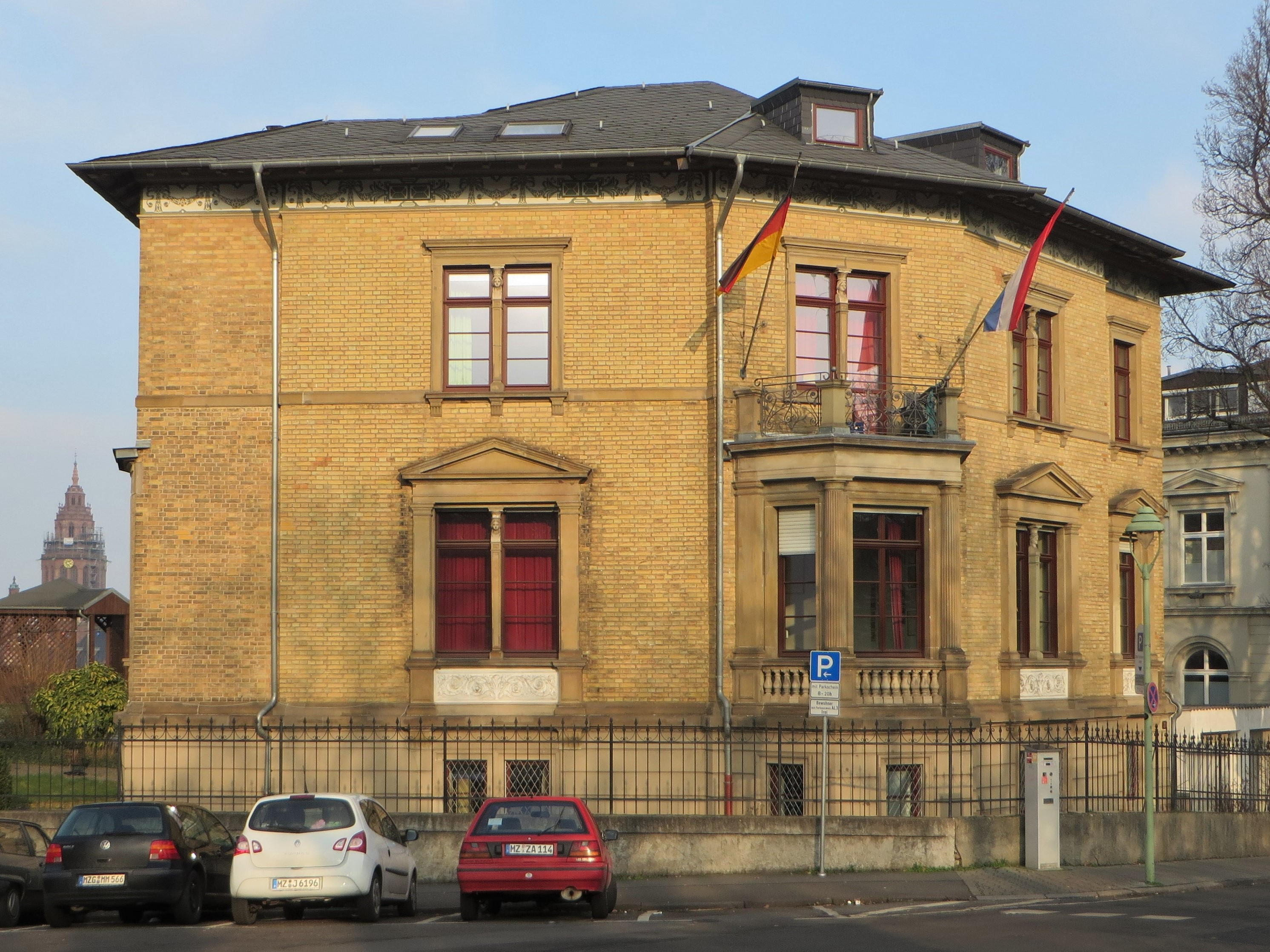 Eisgrubweg 13, 55116 Mainz